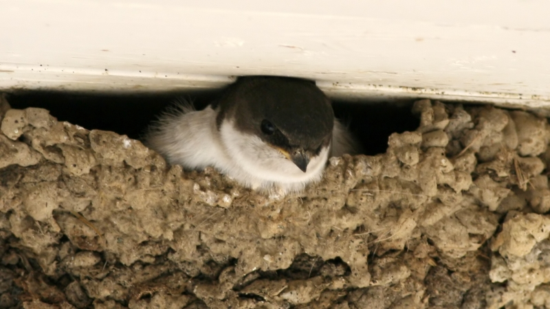 House Martin (Delichon urbicum), Eggersriet SG, Switzerland